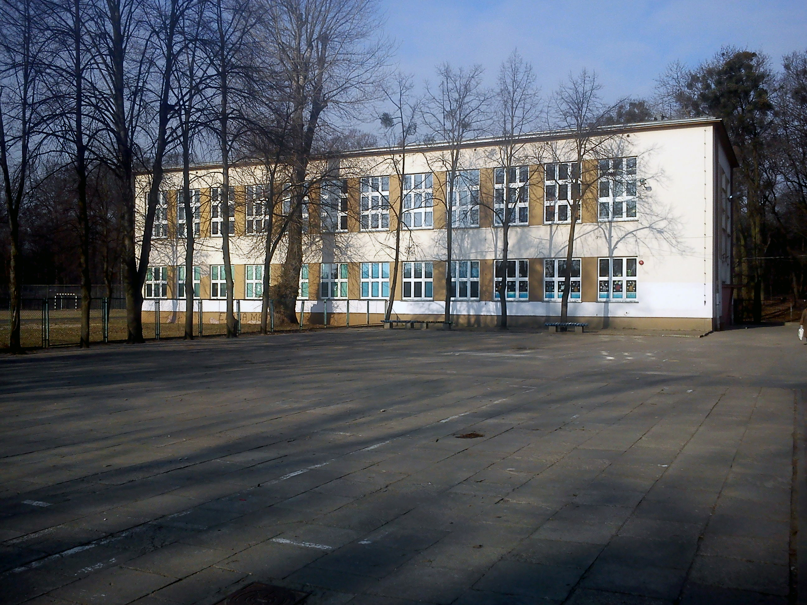 Budynek Szkoły Podstawowej nr 14 w Zespole Szkół nr 14 w Toruniu